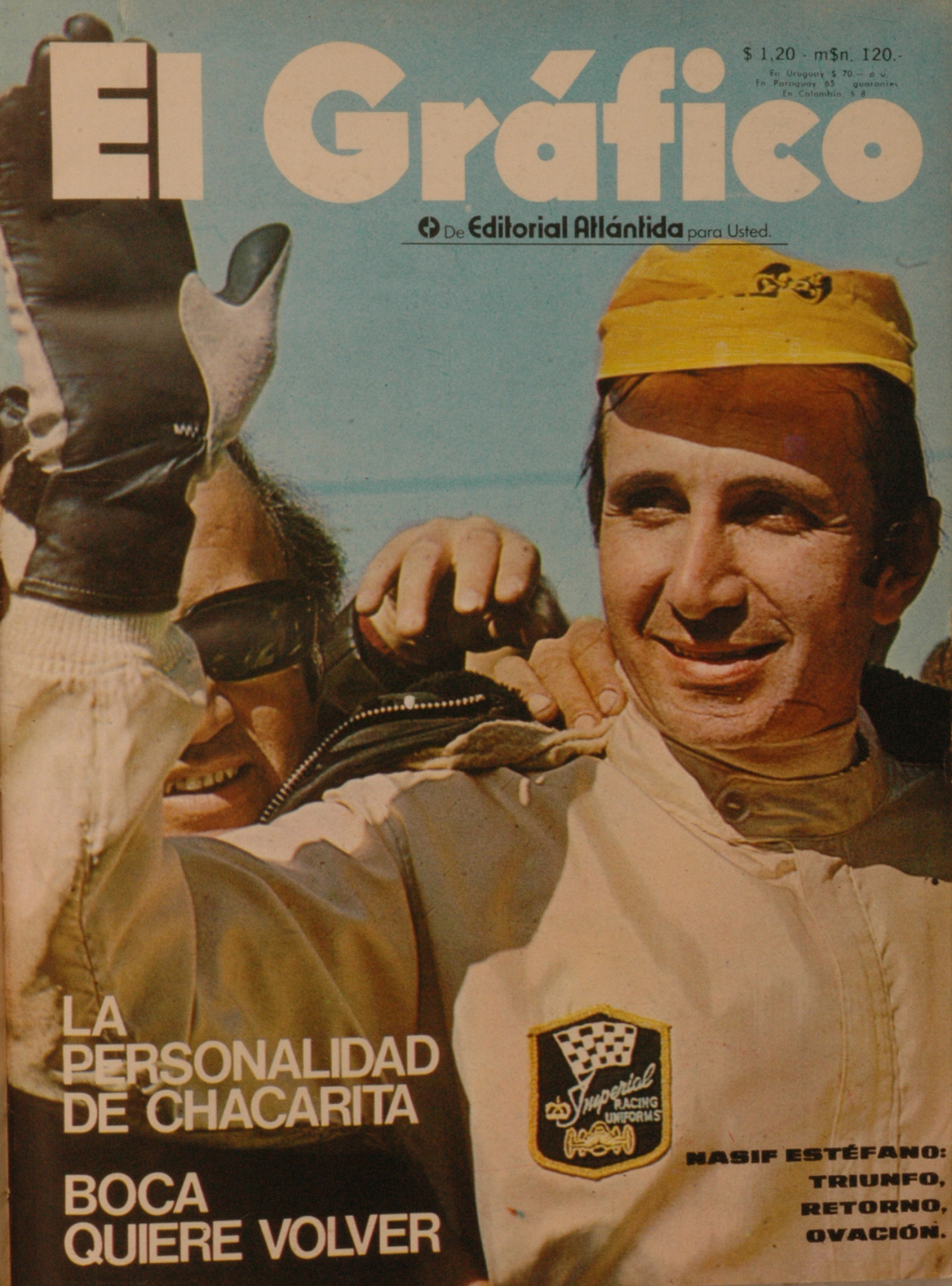 El Grafico del 27 de Abril de 1971. Edicion 2690